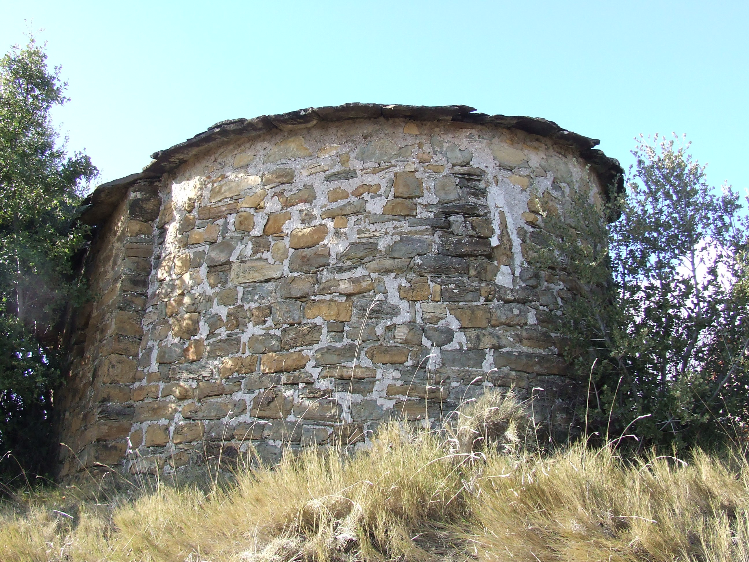 Abasis de Sant Llorenç de Sant Adrià (Gurp de la Conca, Tremp, Pallars Jussà)